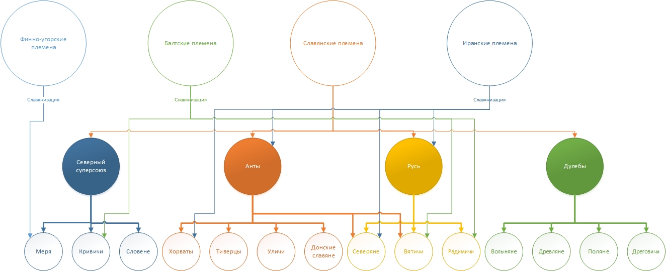 Общности восточнославянских племен Источники: Седов В.В. Славяне: Историко-археологическое исследование. Стр. 26, 192, 272, 321, 414, 525 Седов В.В. Восточные славяне в VI-XIII вв. Стр. 148, 155-157, 164, 174